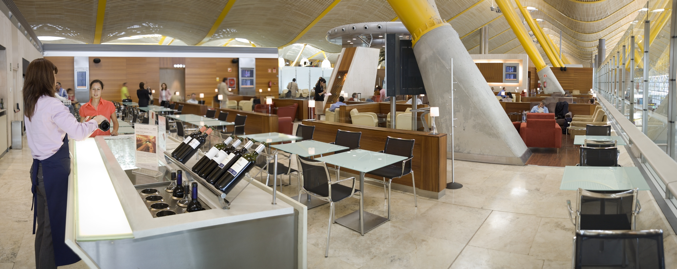 Rincón del vino en la sala VIP en la terminal 4 del aeropuerto de Madrid-Barajas VIP lounge in Madrid Barajas airport terminal 4 Lounge VIP - Salle Dali, aérport de Madrid - Barajas, Terminal 4, le coin vin. VIP - Lounge im Flughafen Madrid Barajas im Terminal 4 Sala VIP nel terminal 4 dell'aereoporto Madrid-Barajas Sala Dali, parte do Lounge Vip do Terminal 4 do aeroporto de Barajas, em Madri